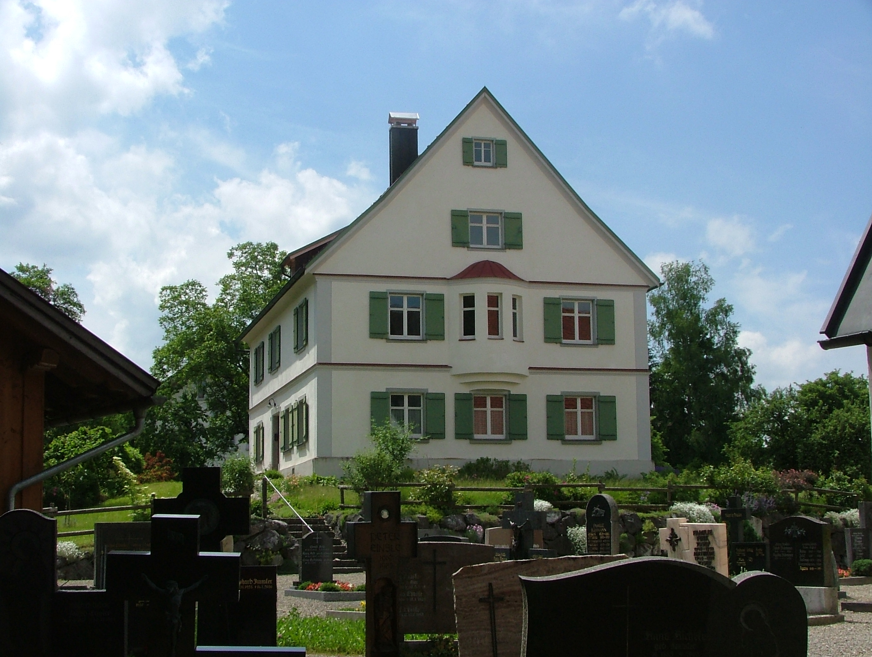 Grünenbach